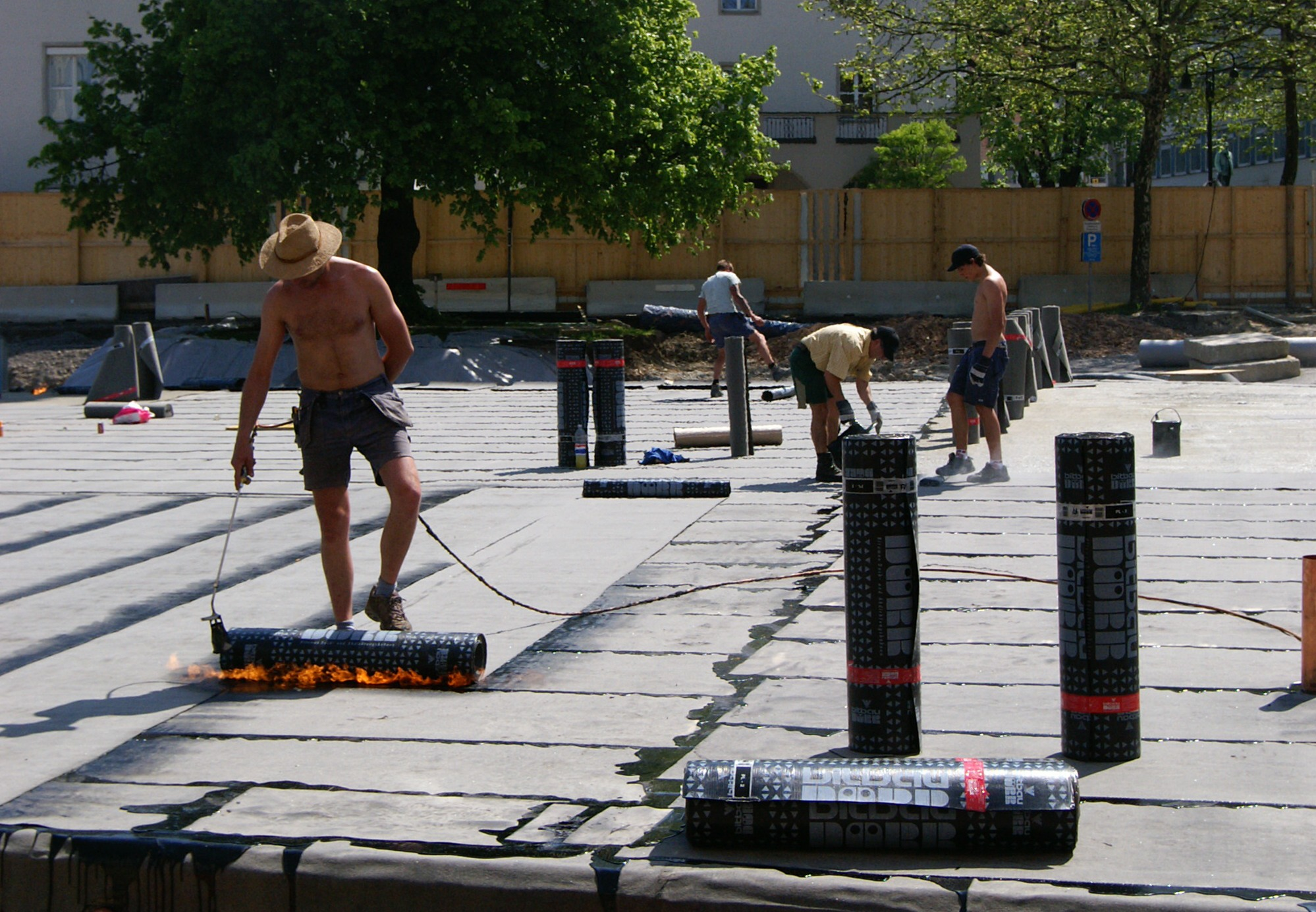 Dachpappe oder Bitumen-Dachbahn ist eine mit Bitumen getränkte Pappe, die als Feuchtigkeitsperre in Bauteilen dient. Hier Arbeiten im Zuge der Sanierung der Stadtstrasse sowie der Parkplatzbewirtschaftung in Dornbirns Innenstadt mit Überbauung des Mäserareals. 2008